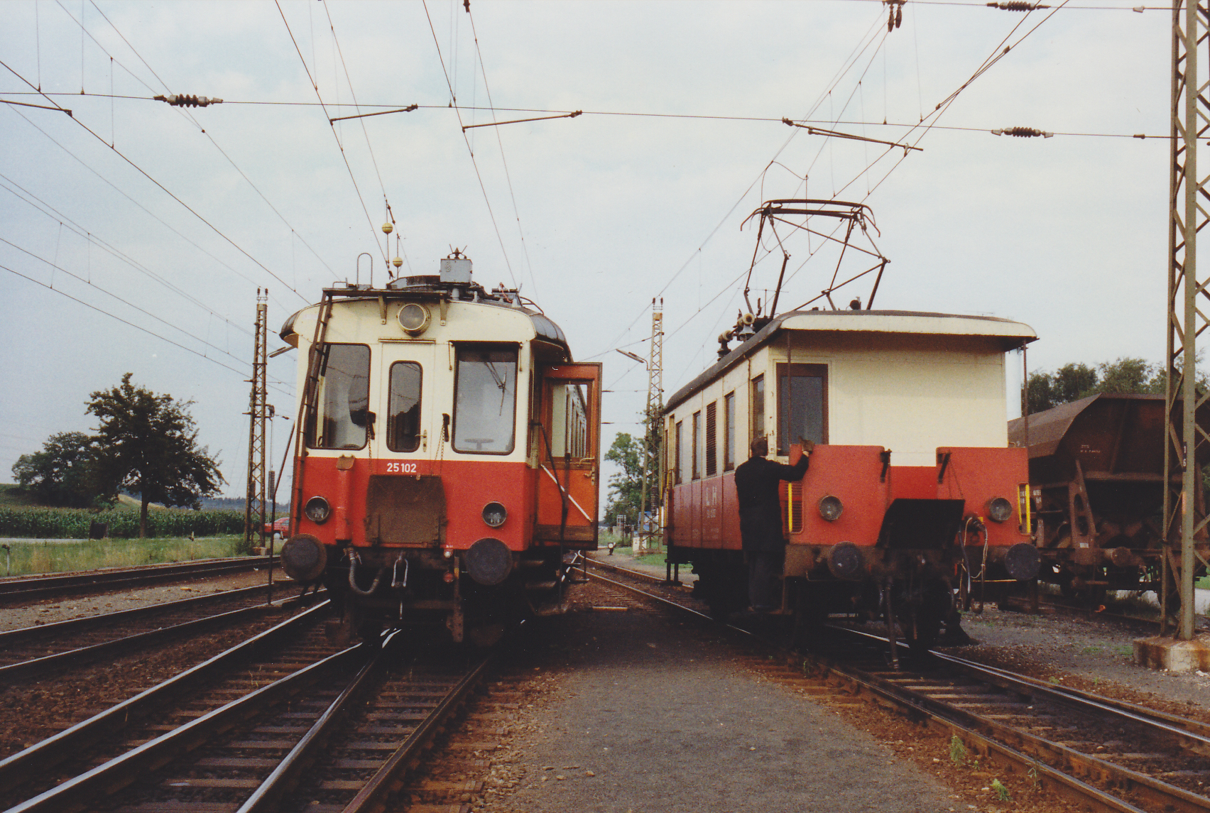 Der Gleichrichterwagen wird in Bachmanning dem planmässigen Personenzug Haag am Hausruck - Lambach beigestellt (Mai 1988)